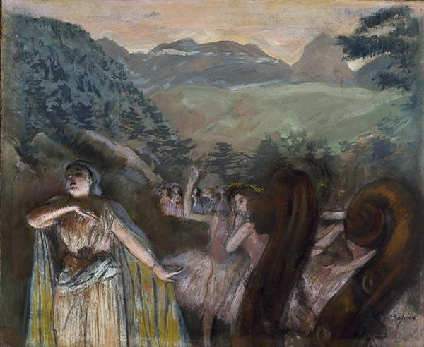 Identifié par le Musée d'art de Dallas et par Jean Sutherland Boggs comme une scène de l'opéra de Giacomo Meyerbeer, L'Africaine.